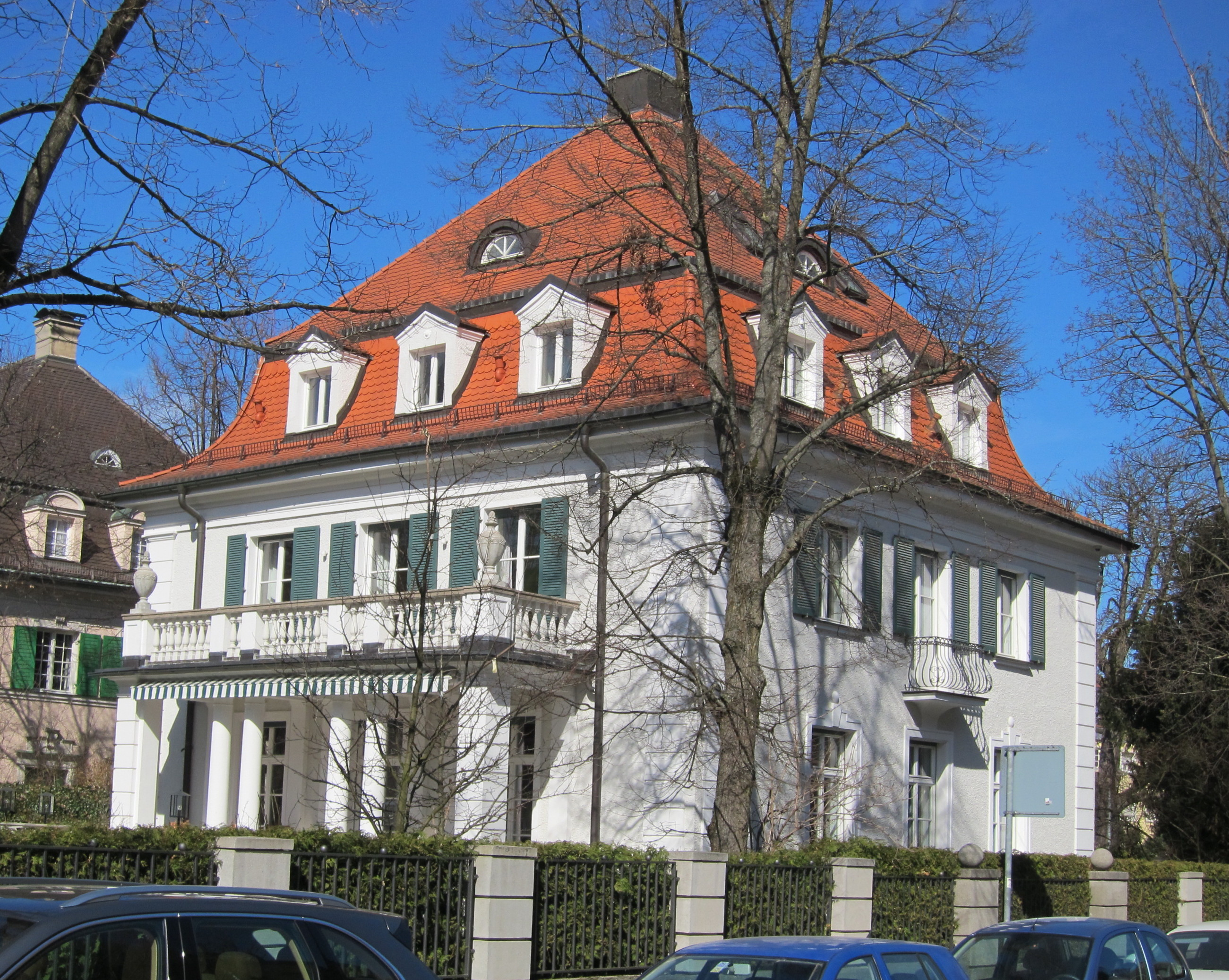 Sternwartstraße 6; Villa, zweigeschossiger putzgegliederter Mansardwalmdachbau in neuklassizistischen Formen mit übergiebeltem Mittelrisalit, Altane und Stuckdekor, von Heilmann & Littmann, 1924.